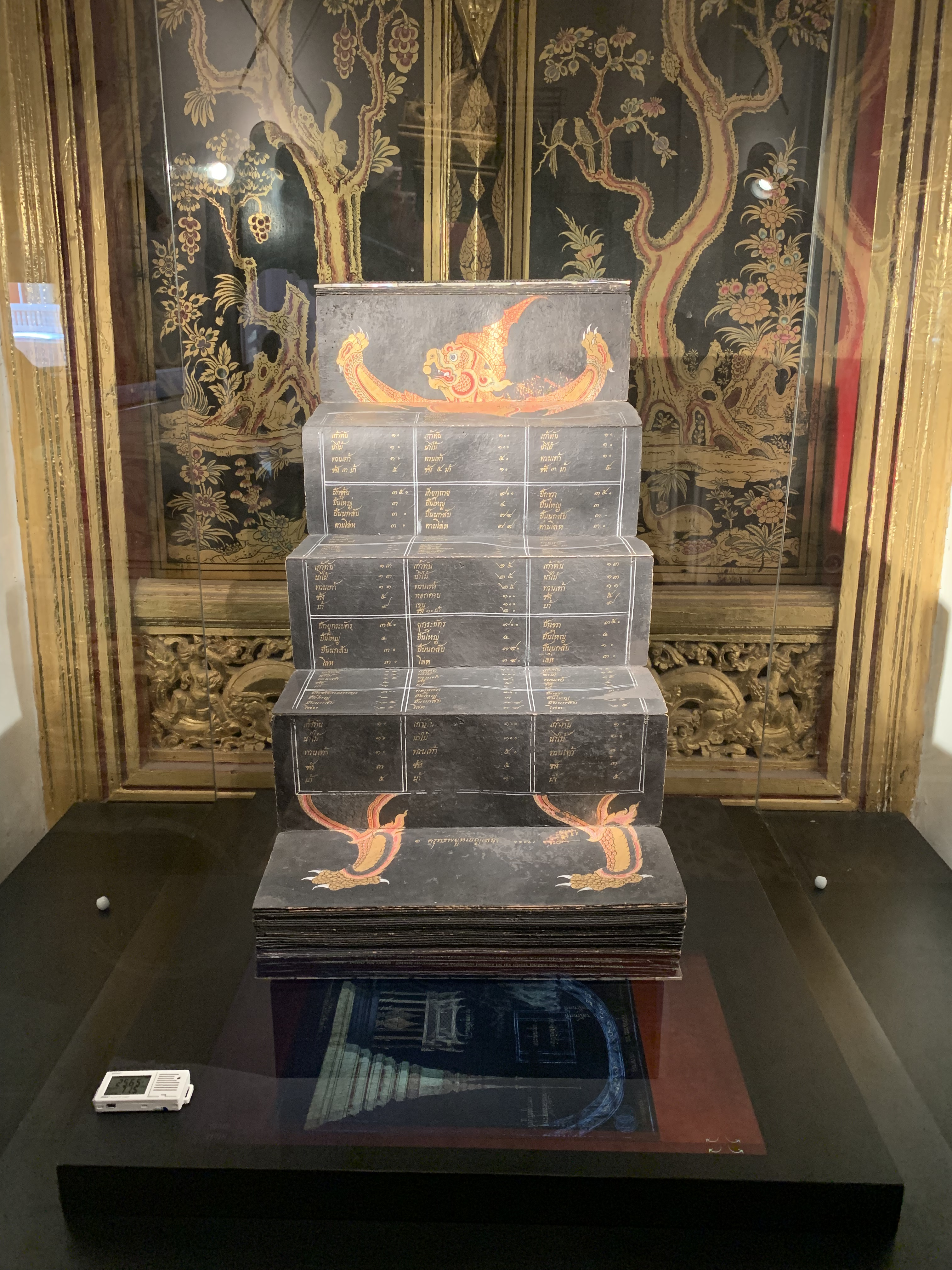 ส่วนหนึ่งของคัมภีร์พิชัยสงคราม จัดแสดงที่พิพิธภัณฑสถานแห่งชาติพระนคร